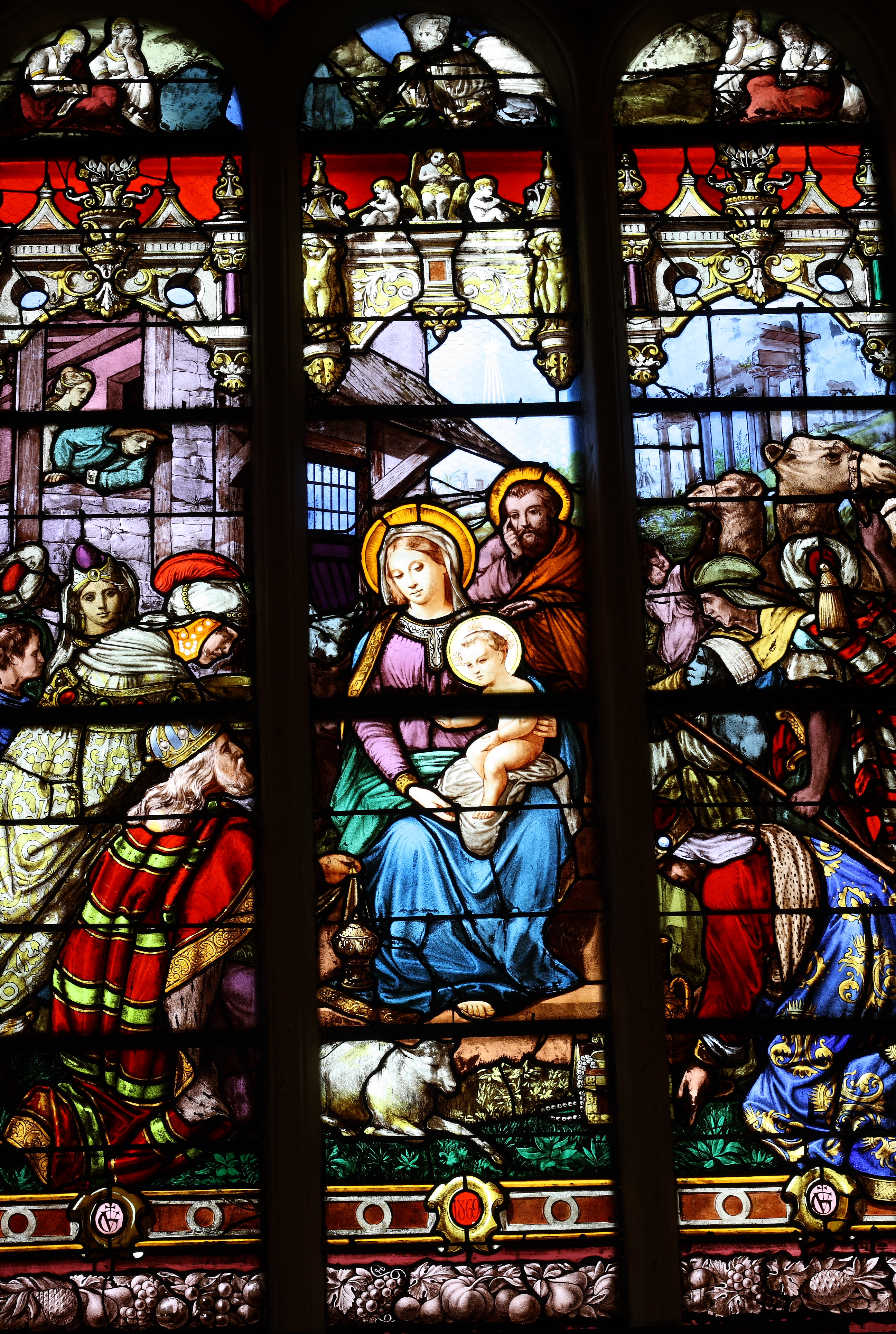 Katholische Pfarrkirche Saint-Martin in Triel-sur-Seine, einer Gemeinde im Département Yvelines (Île-de-France), Bleiglasfenster mit Fragmenten des 16. Jahrhunderts, Darstellung: die Anbetung der Heiligen Drei Könige (Ausschnitt); unten: Jahreszahl 1869 und Monogramm des Glasmalers V. GUILBERT